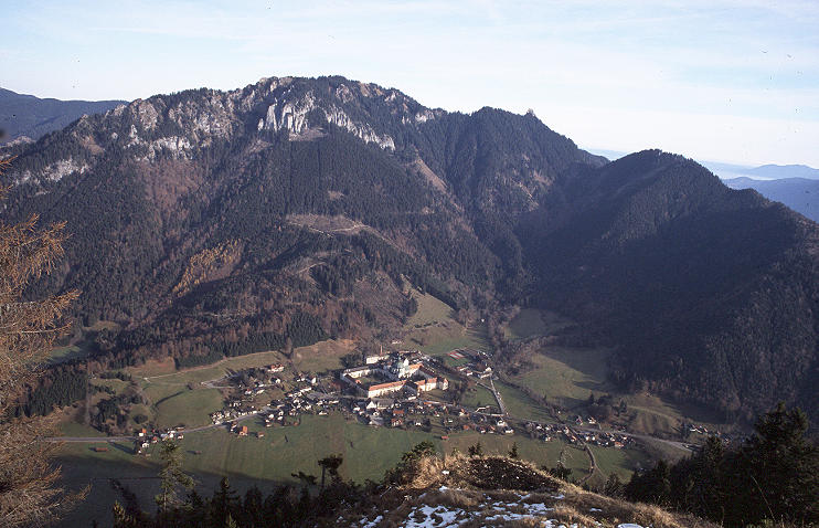 Ettaler Mandl von der Notkarspitze * selbst fotografiert (9. November 2003) * Lizenz: GNU-FDL